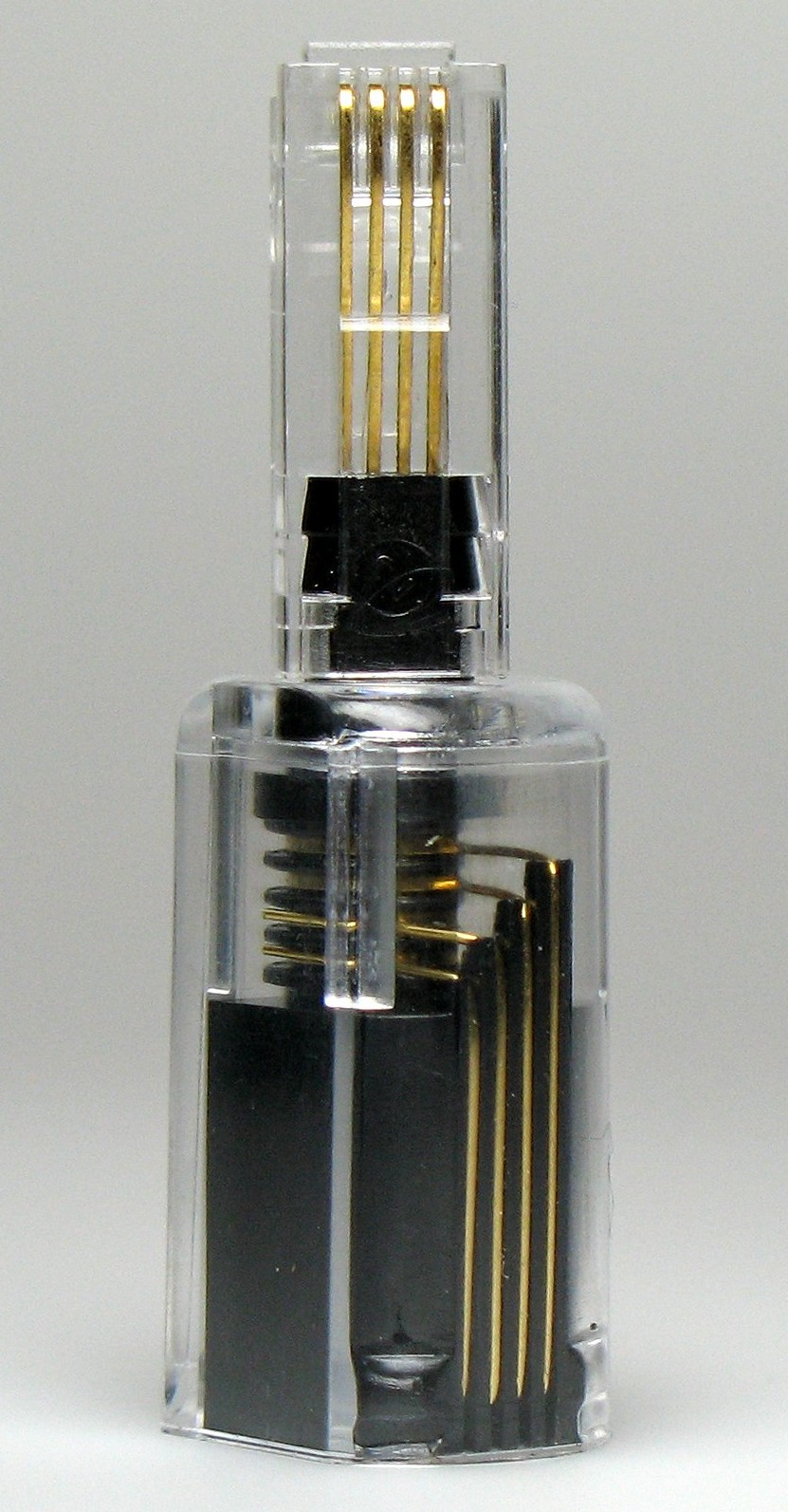 Foto einer Telefonkabelentwirr-Steckmoduls